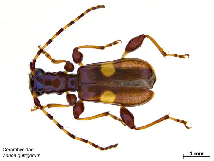 Zorion guttigerum